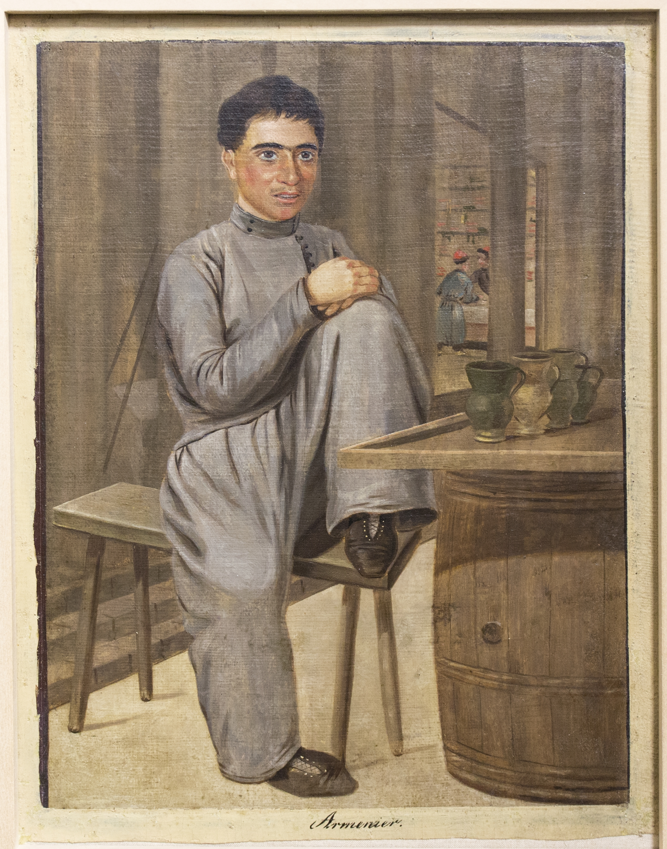 GLAM-on-Tour: Wiki goes MEK! Wikipedianer fotografierten am 25. und 26. November 2017 im Museum Europäischer Kulturen. This photo was taken during a project supported by WMDE. Gefördert von / Supported by: Wikimedia Deutschland, Museum Europäischer Kulturen Vom Maler Wilhelm Kiesewetter. Wilhelm Kiesewetter (Maler), Armenischer Getränkeverkäufer, Öl auf Leinwand Höhe x Breite: 34,5 x 26,1 cm Ident.Nr. II E 136 Bestand vom MEK (Museum Europäischer Kulturen) im Schaudepot.